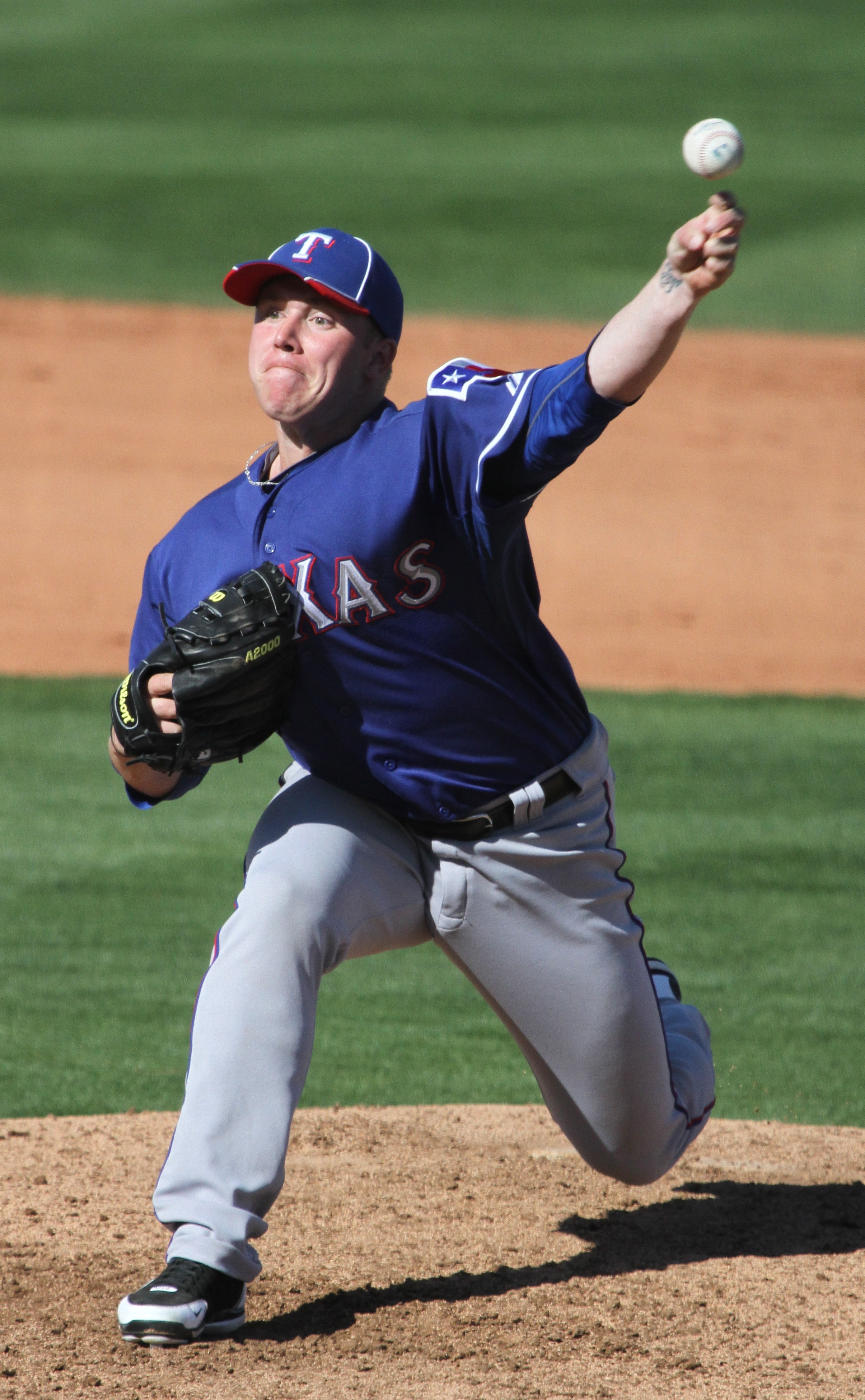 Robbie Ross Jr.